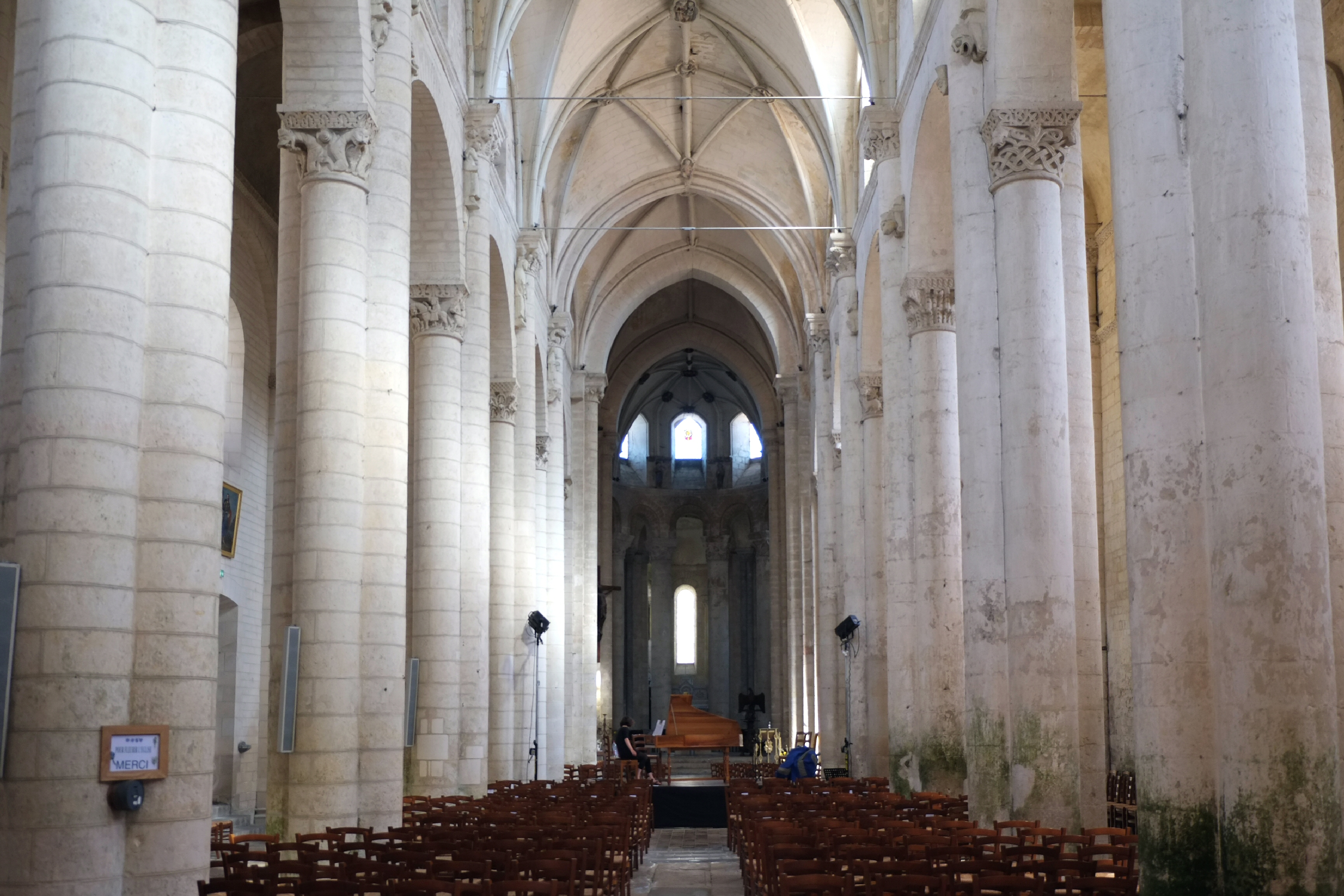 Nef de l'église abbatiale Saint-Pierre Airvault Deux-Sèvres France